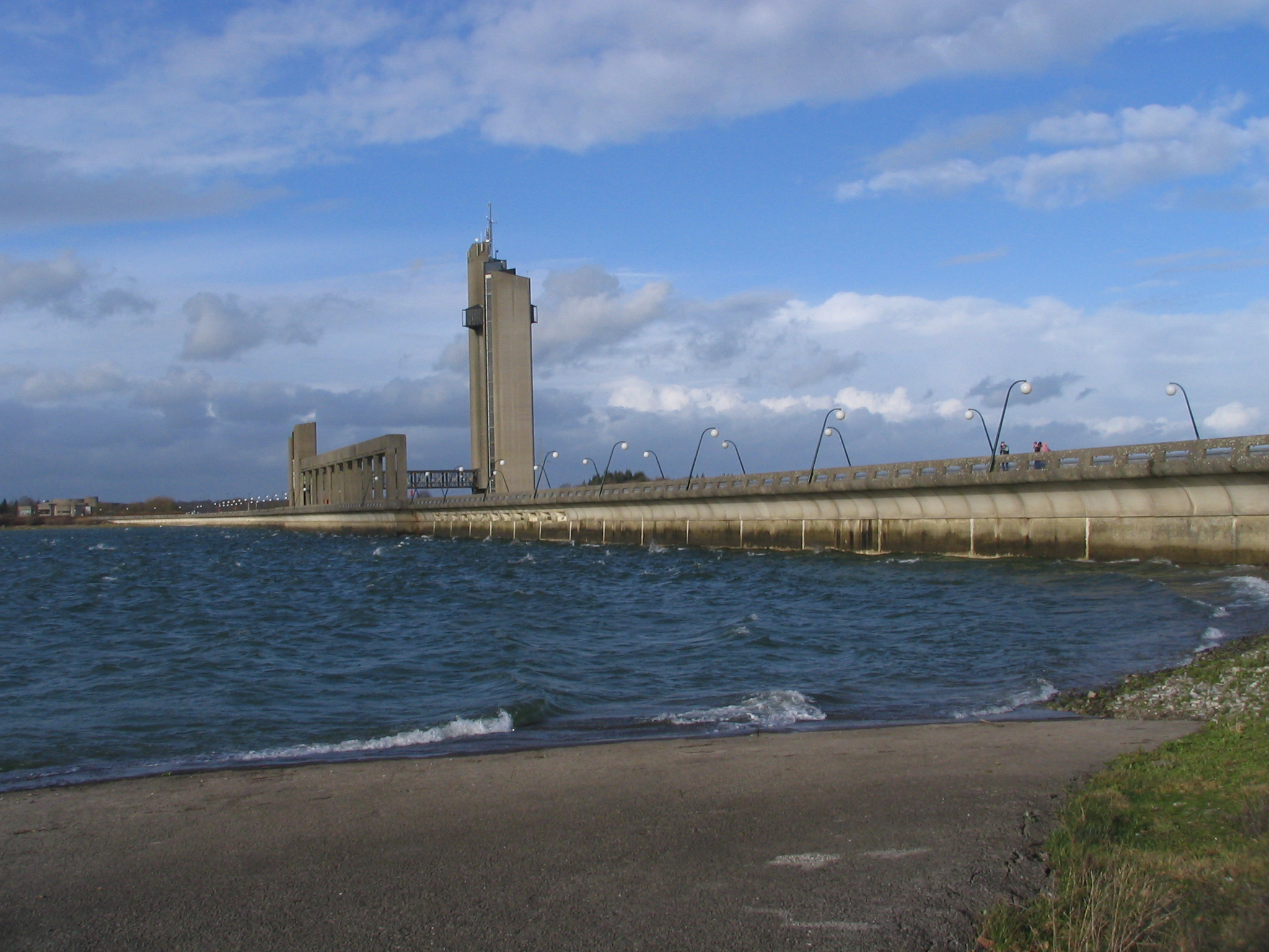 Barrage hydro électrique installé sur le cour de l'Eau d'Heure en Belgique. Hydo-electrique dam set on the river "l'Eau d'Heure"in Belgium.